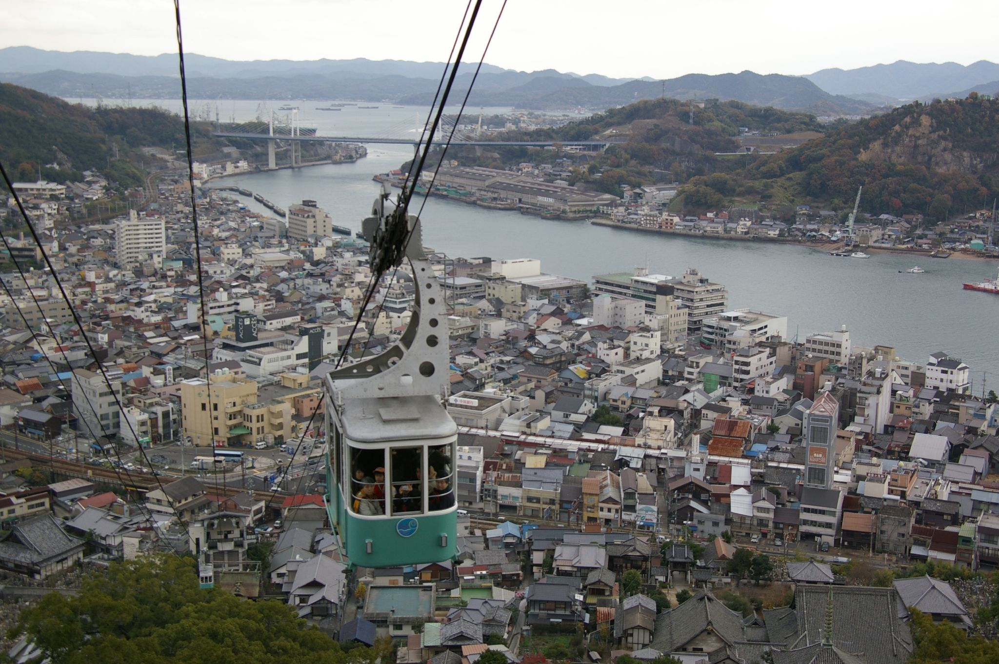 Канатная дорога в Ономити